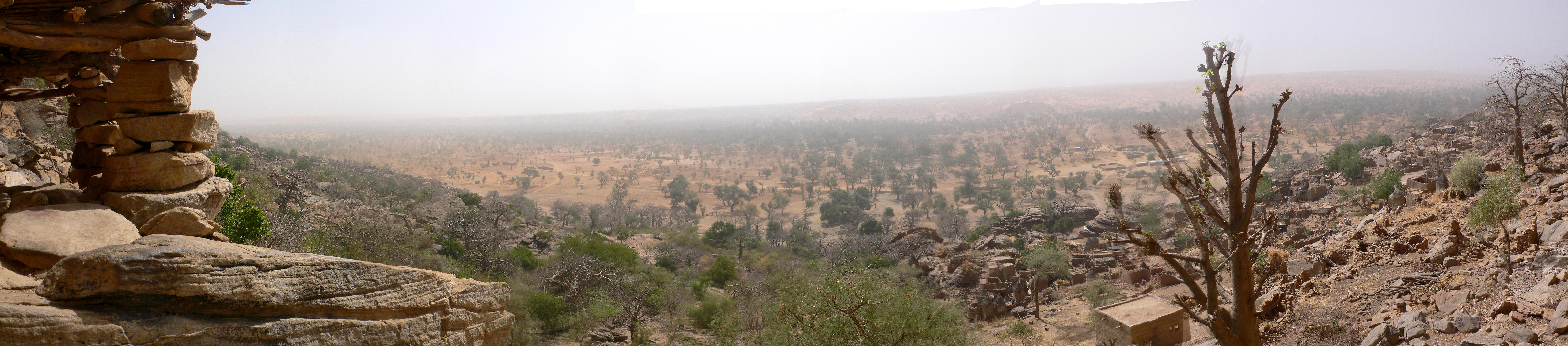 Vue du pays dogon depuis la falaise